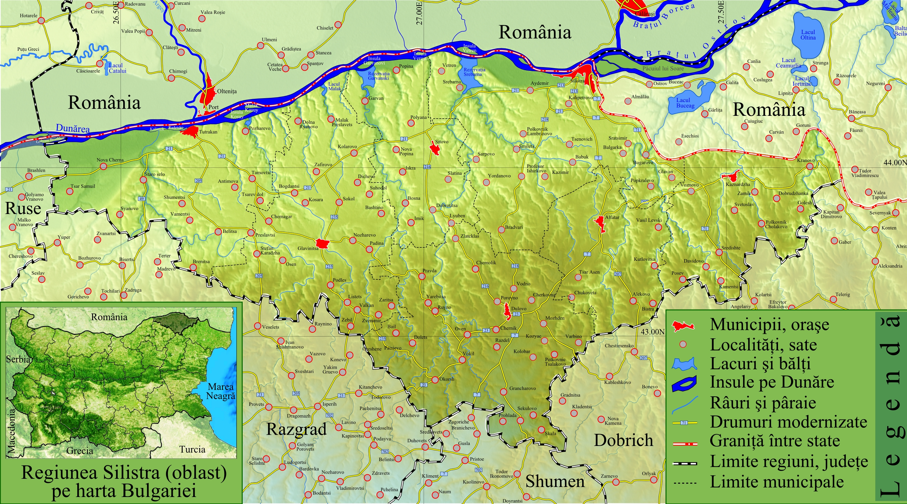 Regiunea Silistra, Bulgaria.